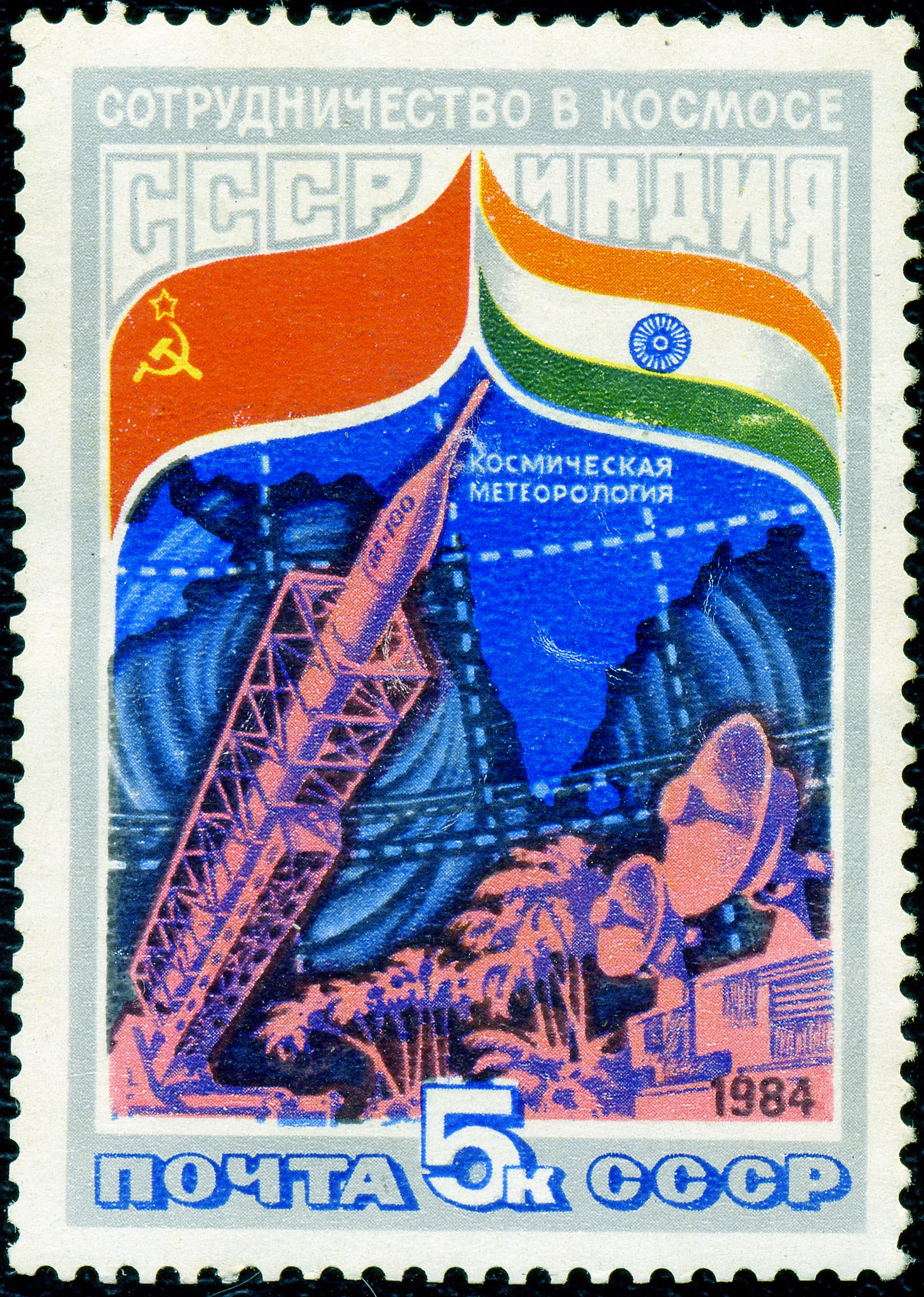 Почтовая марка СССР. 1984. Интеркосмос